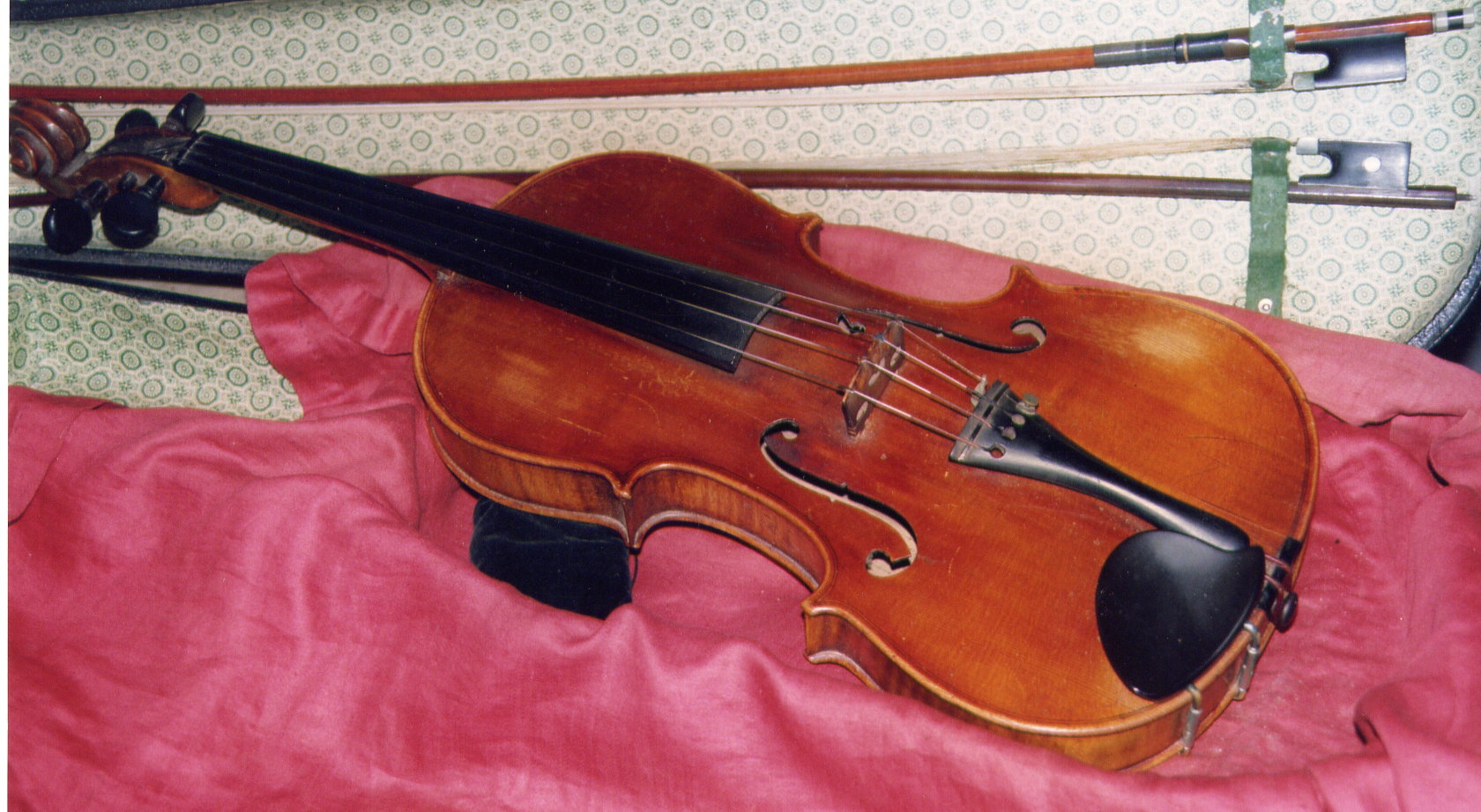 Violon par le luthier ALDRIC à Paris, année 1826, longueur totale: 59 cm, longueur supérieure:16,5 cm, longueur inférieure: 21 cm.